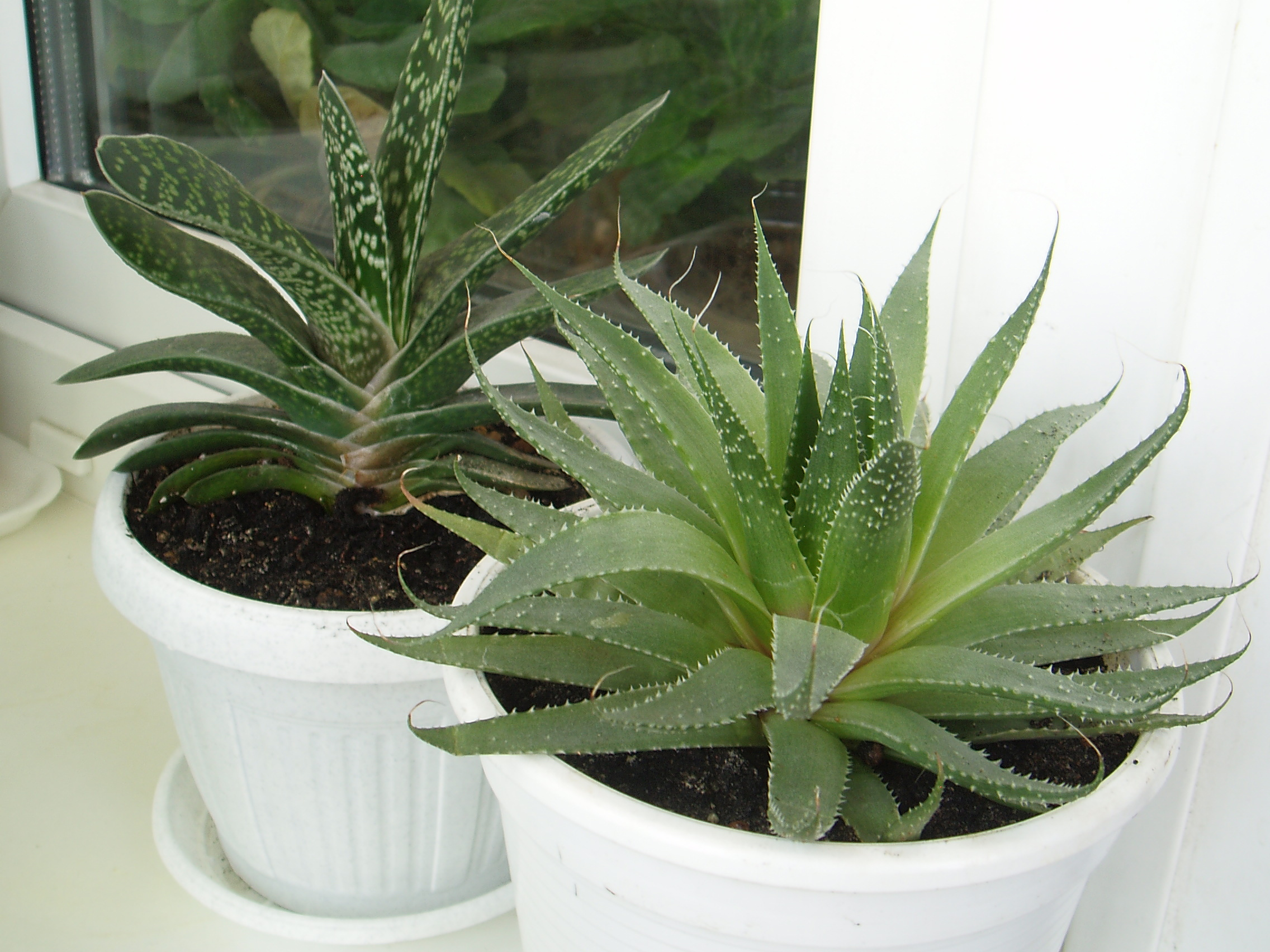 Беларуская (тарашкевіца): Гастэрыя і альяс асьцісты